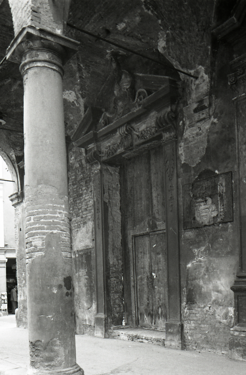 Servizio fotografico : Bologna, 1970 / Paolo Monti. - Strisce: 7, Fotogrammi complessivi: 35 : Negativo b/n, gelatina bromuro d'argento/ pellicola ; 35 mm. - ((I fotogrammi hanno una doppia numerazione. . - Sul portanegativi: Nikmat FP4. - Sul dorso del portanegativi Monti specifica: "Persone". - Fonte: Agenda di Paolo Monti: Monti - Agenda 1970 (1970), presso Archivio Paolo Monti